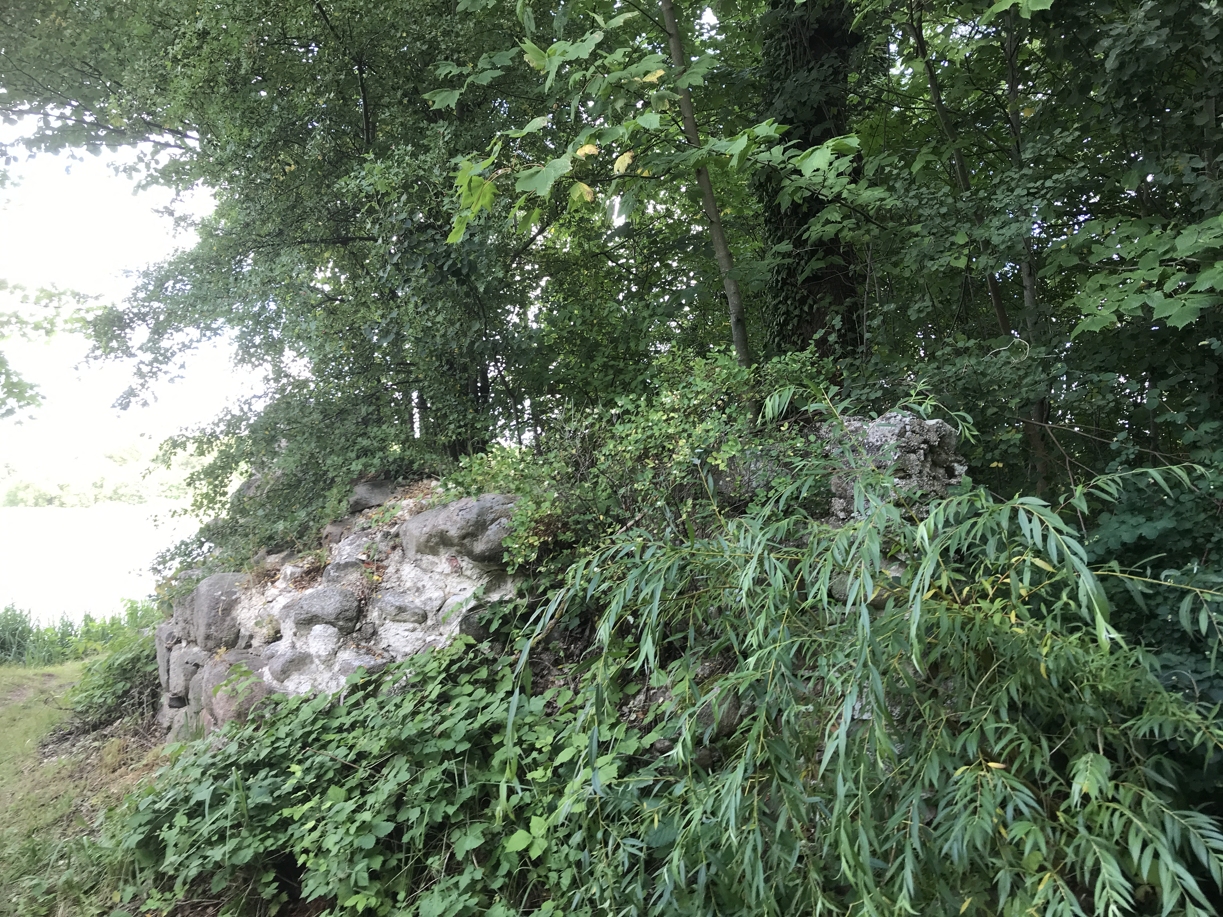 Der Schönhauser See ist ein Gewässer in der gleichnamigen Gemeinde im Landkreis Mecklenburgische Seenplatte in Mecklenburg-Vorpommern.